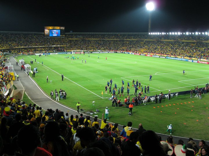 Partido Colombia - México, Copa Mundial Sub 20 de la FIFA Colombia 2011